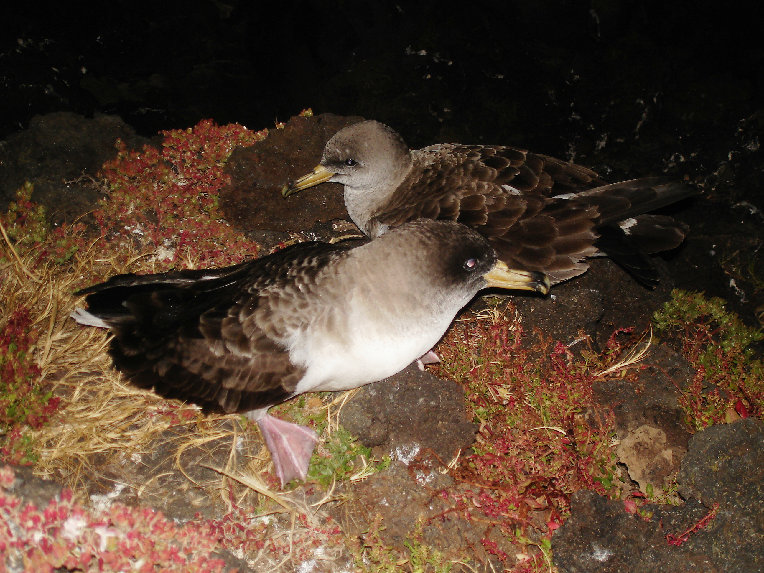 isola di Linosa